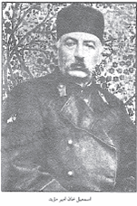 کتاب حماسه هژبر سلطان، بخش ضمیمه ها ، نوشته زین العابدین درگاهی، چاپ 1387 مازِرونی: کتاب حماسه هژبر سلطان، بخش ضمیمه ئون ، بنویشته زین العابدین درگاهی، چاپ 1387